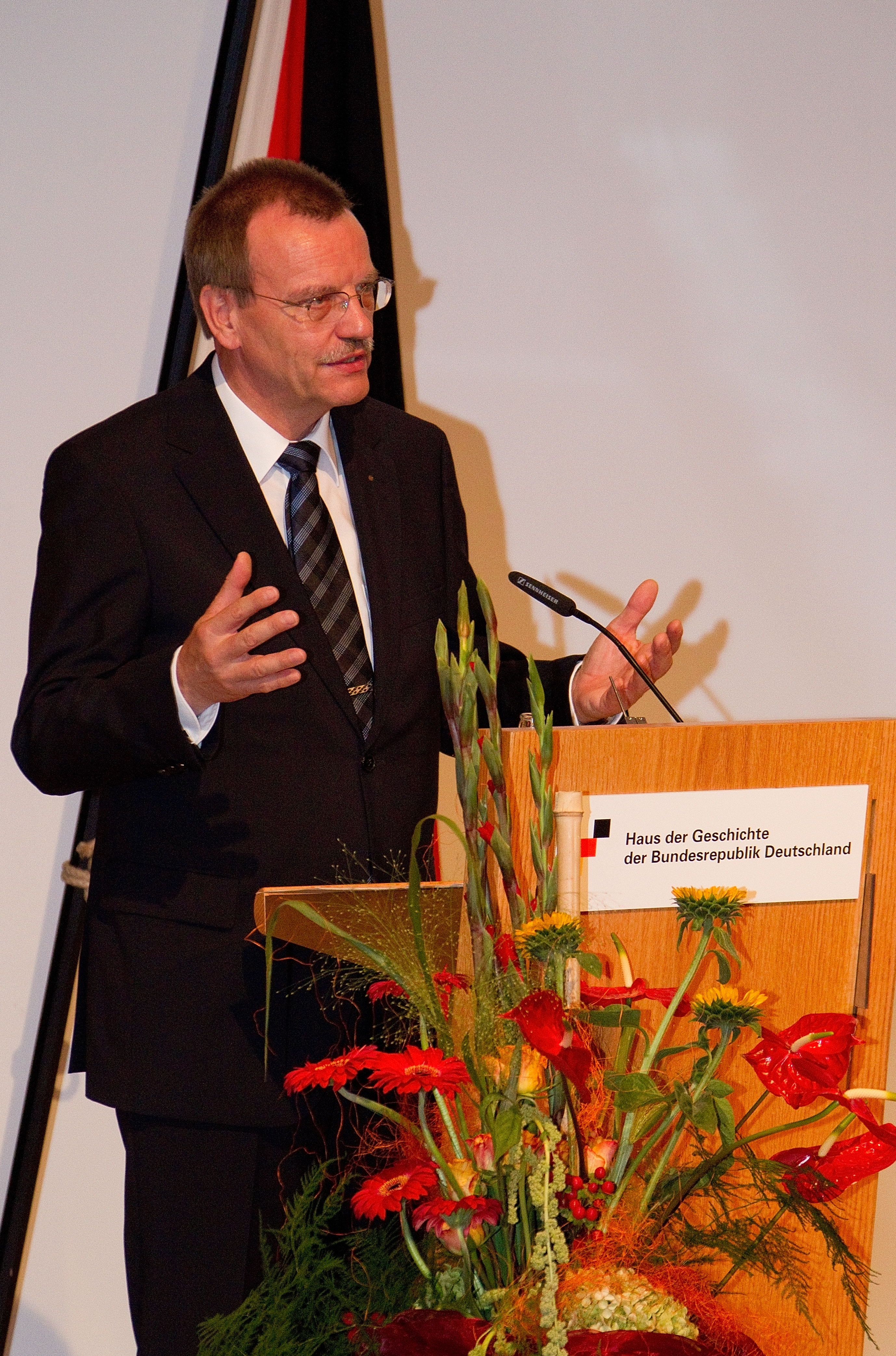 Dankwort durch den Präsident des BAUIDBw, Matthias Leckel..Am 30.Juli 2012 wurde in Bonn das Bundesamt für Infrastruktur, Umweltschutz und Dienstleistungen der Bundeswehr (BAIUDBw) in Dienst gestellt.Hierzu findet ein Festakt im Haus der Geschichte in Bonn statt. In diesem Rahmen werden neben dem Bundesminister der Verteidigung, Dr. Thomas de Maizière auch der Oberbürgermeister der Bundesstadt Bonn, Jürgen Nimptsch, die Abteilungsleiterin Infrastruktur, Umweltschutz und Dienstleistungen im Bundesministerium der Verteidigung Ministerialdirektorin Alice Greyer-Wieninger sowie der Präsident des BAUIDBw, Matthias Leckel, Worte an die Gäste richten.Das neue Bundesamt übernimmt zentrale Aufgaben für die Bundeswehr, die bislang.u.a. im Verteidigungsministerium, im bisherigen Bundesamt für Wehrverwaltung und den aufzulösenden Wehrbereichsverwaltungen und Infrastrukturstäben wahrgenommen wurden.Die Bündelung fachlicher und organisatorischer Kompetenz sowie die zentrale Aufgabenwahrnehmung in überwiegend gemischt zivil-militärischen Strukturen führen zu einem Wegfall von Schnittstellen, zur Stärkung der Effektivität und der Effizienz und zu einer Verschlankung und Beschleunigung der Prozesse.© Bundeswehr / Mandt